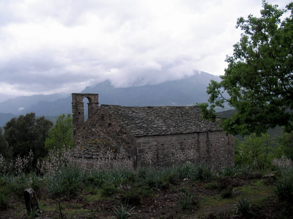 Corsu: A ghjesgia San Martinu d'Erbaghjolu